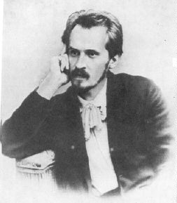 Edward Abramowski (1868-1918)